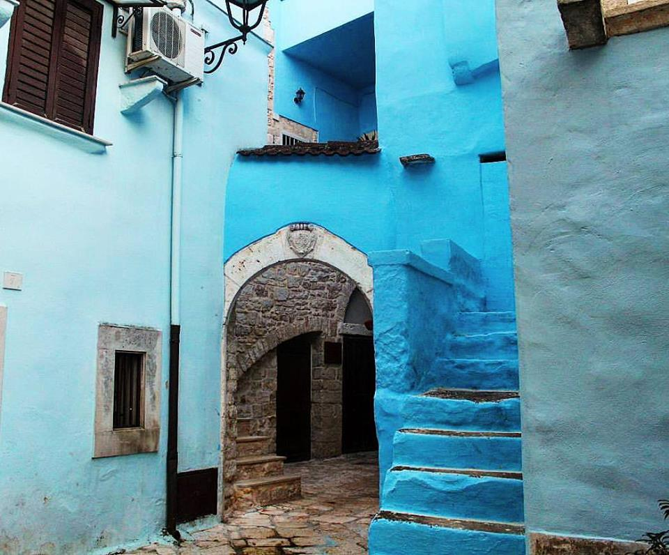 Casamassima, il paese azzurro di Puglia. Chiasso Bongustai